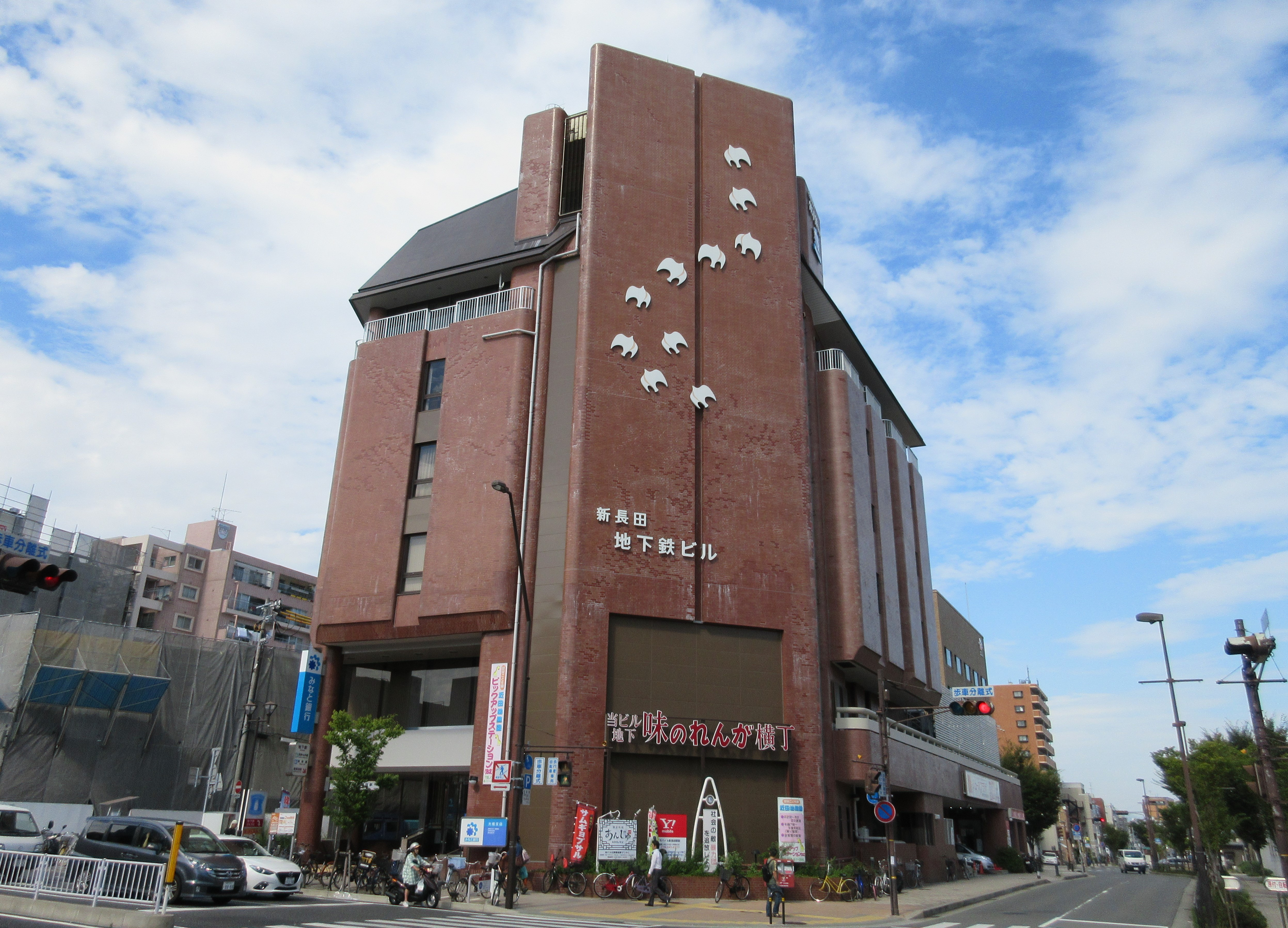 新長田地下鉄ビル